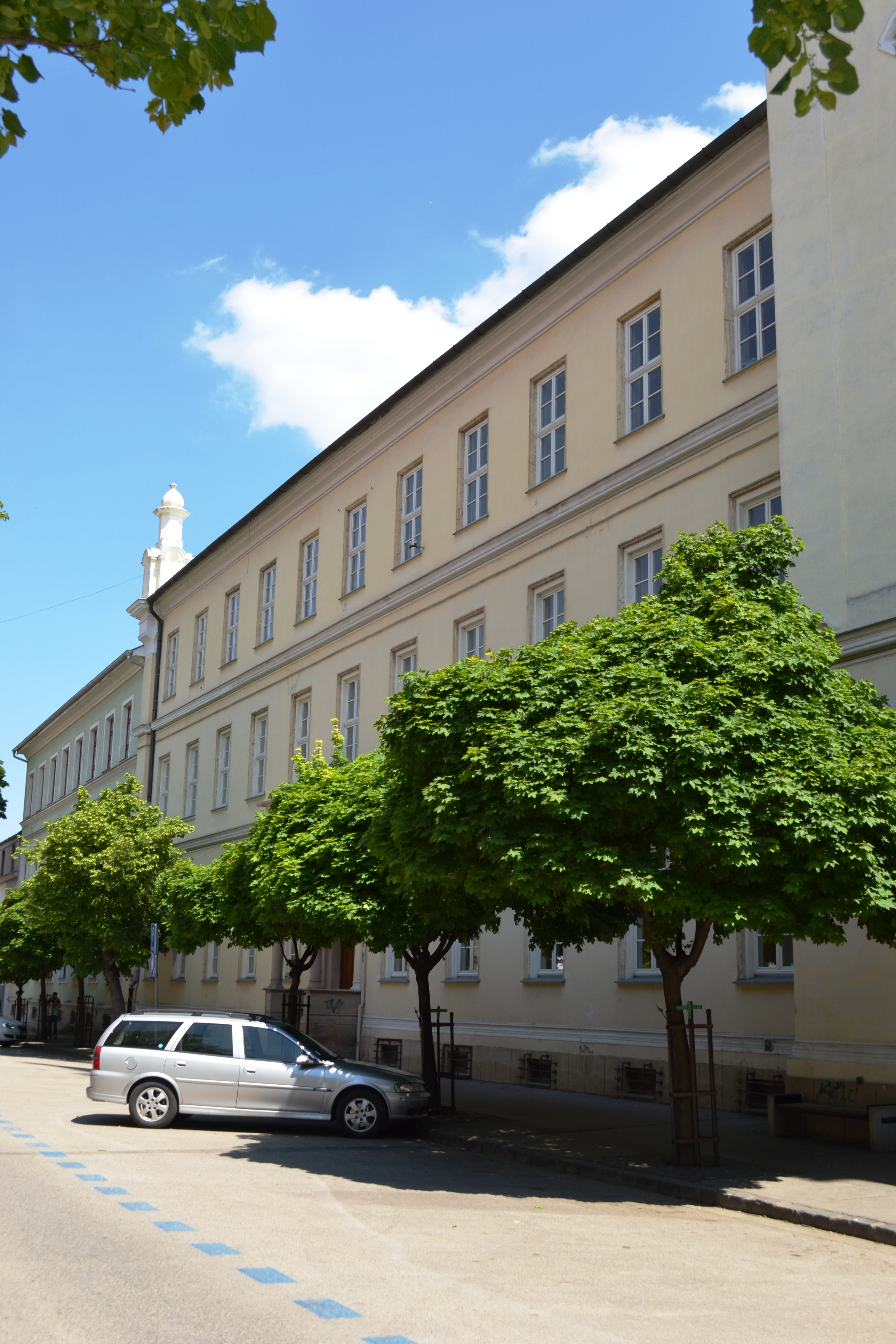 Spojená katolícka škola v Nitre